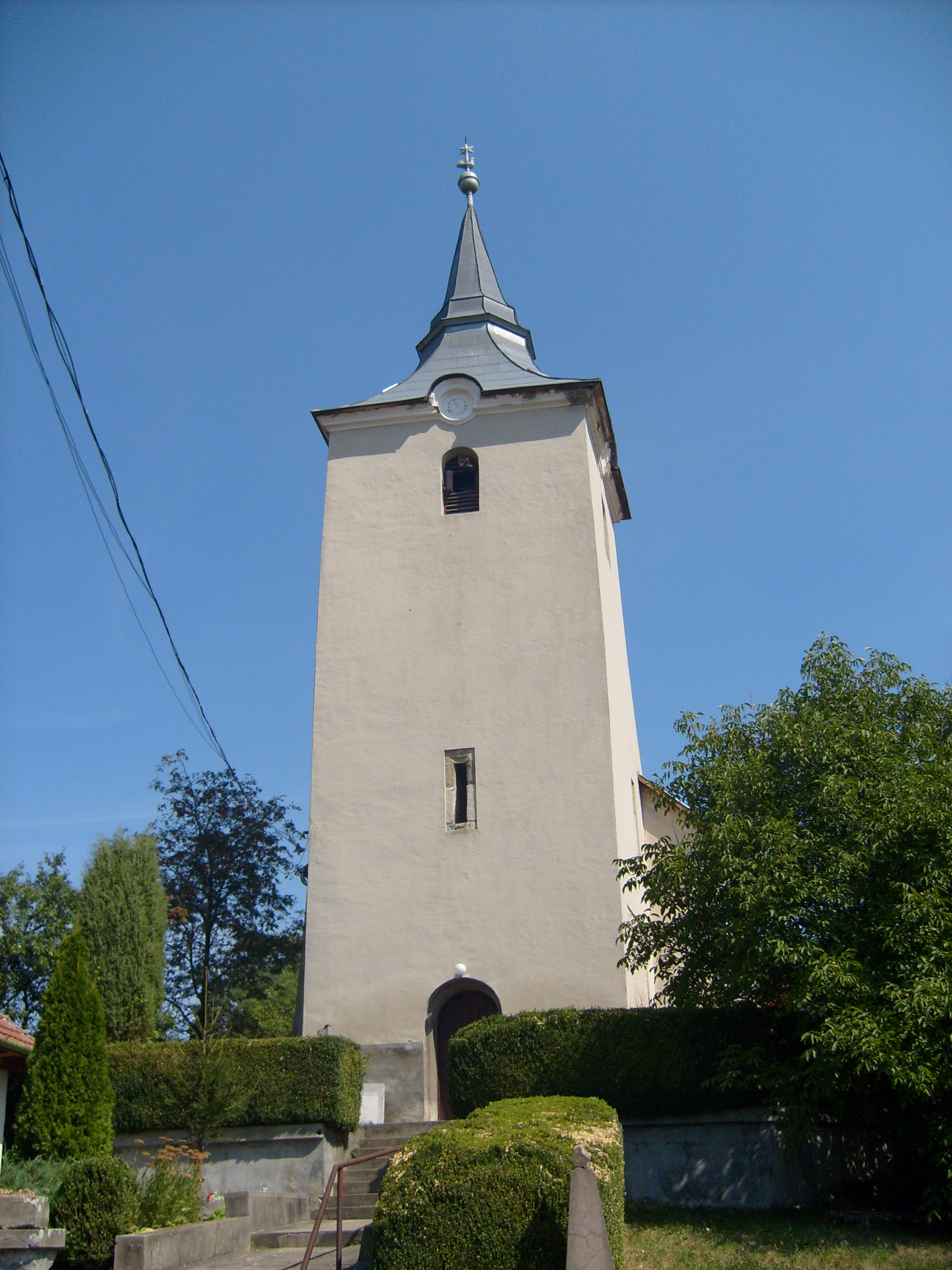 A keleméri református templom